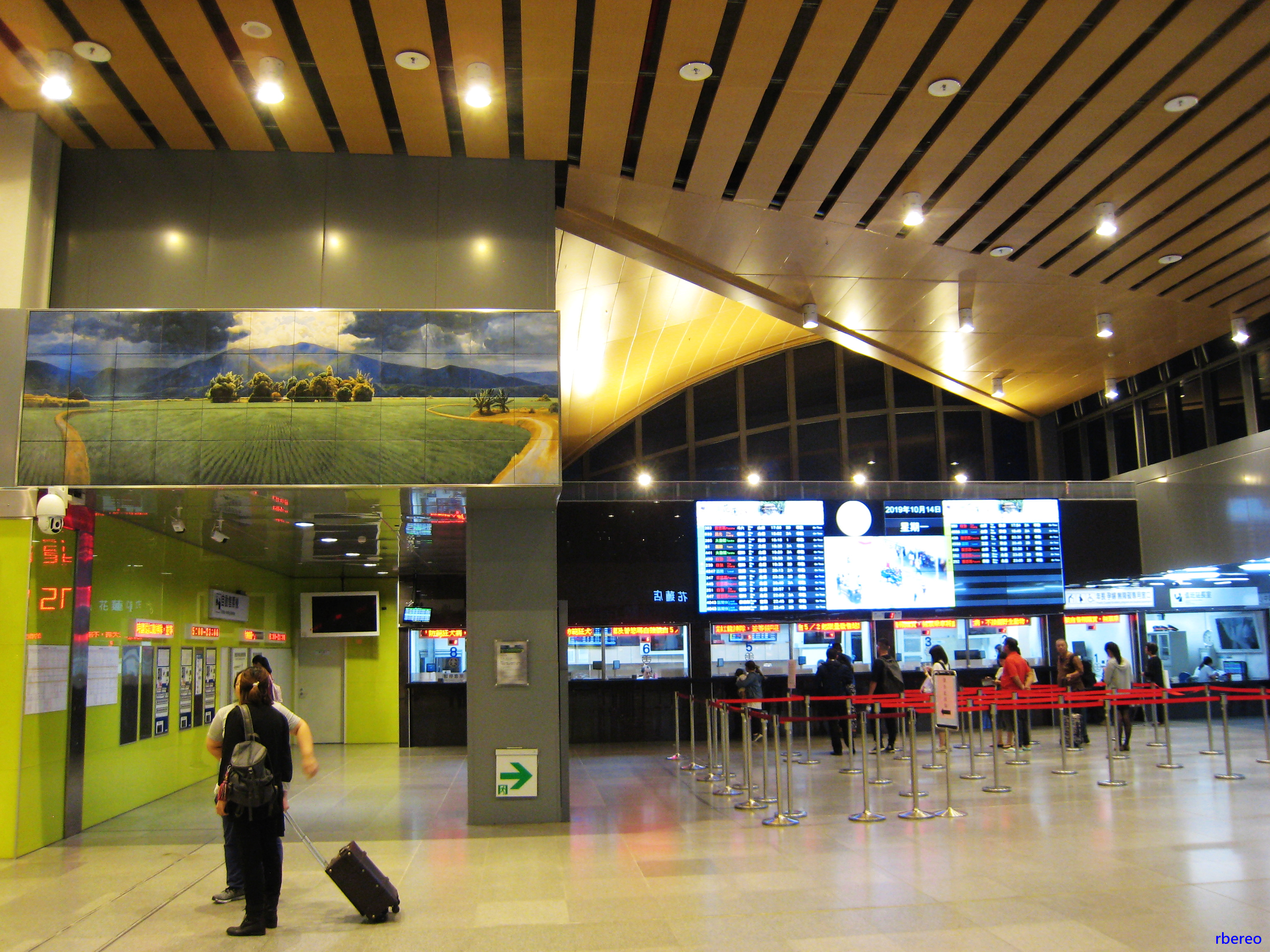 108年10月花蓮車站3樓售票大廳